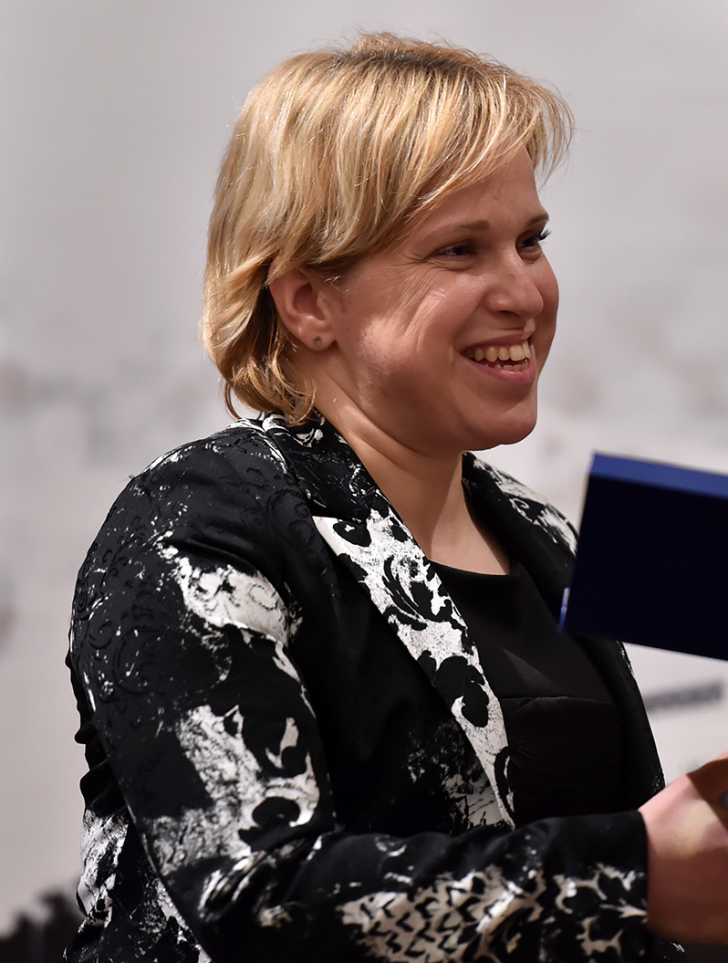 Veronika Vadovičová